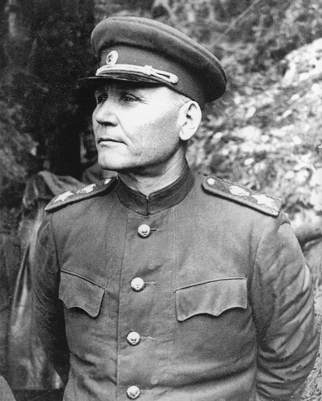 Il maresciallo sovietico Ivan Konev, comandante del I Fronte ucraino